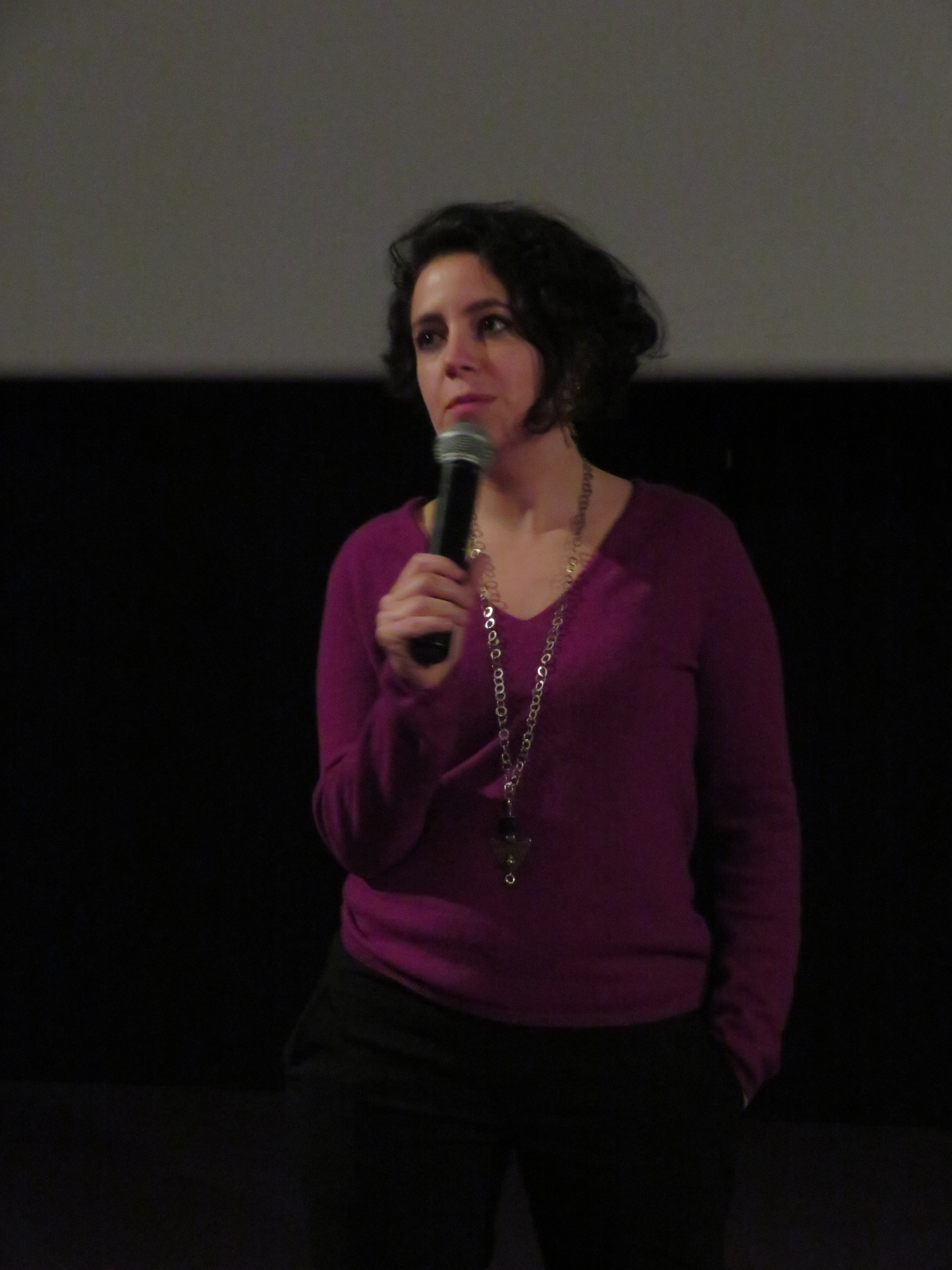 La réalisatrice et scénariste tunisienne Leyla Bouzid, présentant le film "Vent du Nord", en avant première le jeudi 22 mars 2018, à Beauvais.